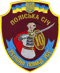 Нарукавний знак, 10 окремий мотопіхотний батальйон